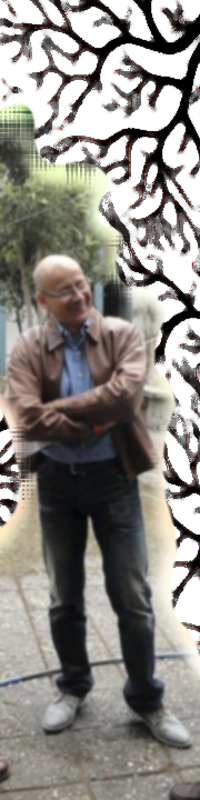 Foto intervenida digitalmente en la que parece Marcos Restrepo